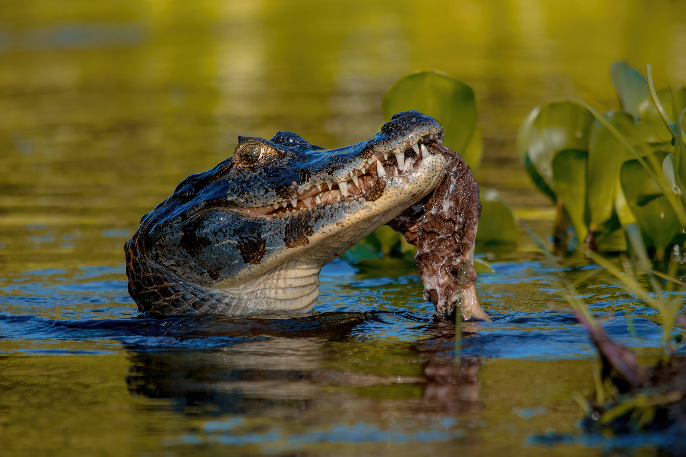 Flagrado durante almoço.